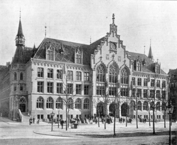 Gebäude der Handelsschule Köln, später erster Sitz der Handelshochschule Köln, heute Hansagymnasium; Köln-Mitte, Hansaring 56; erbaut 1898-1899